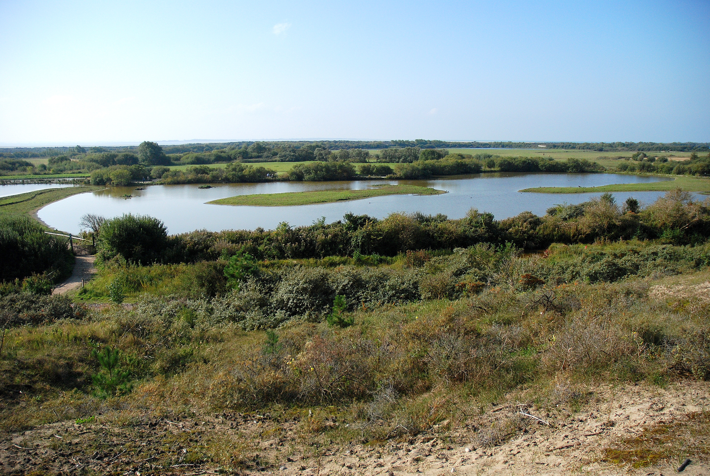 Het ornithologisch park Marquenterre in Picardië, Frankrijk